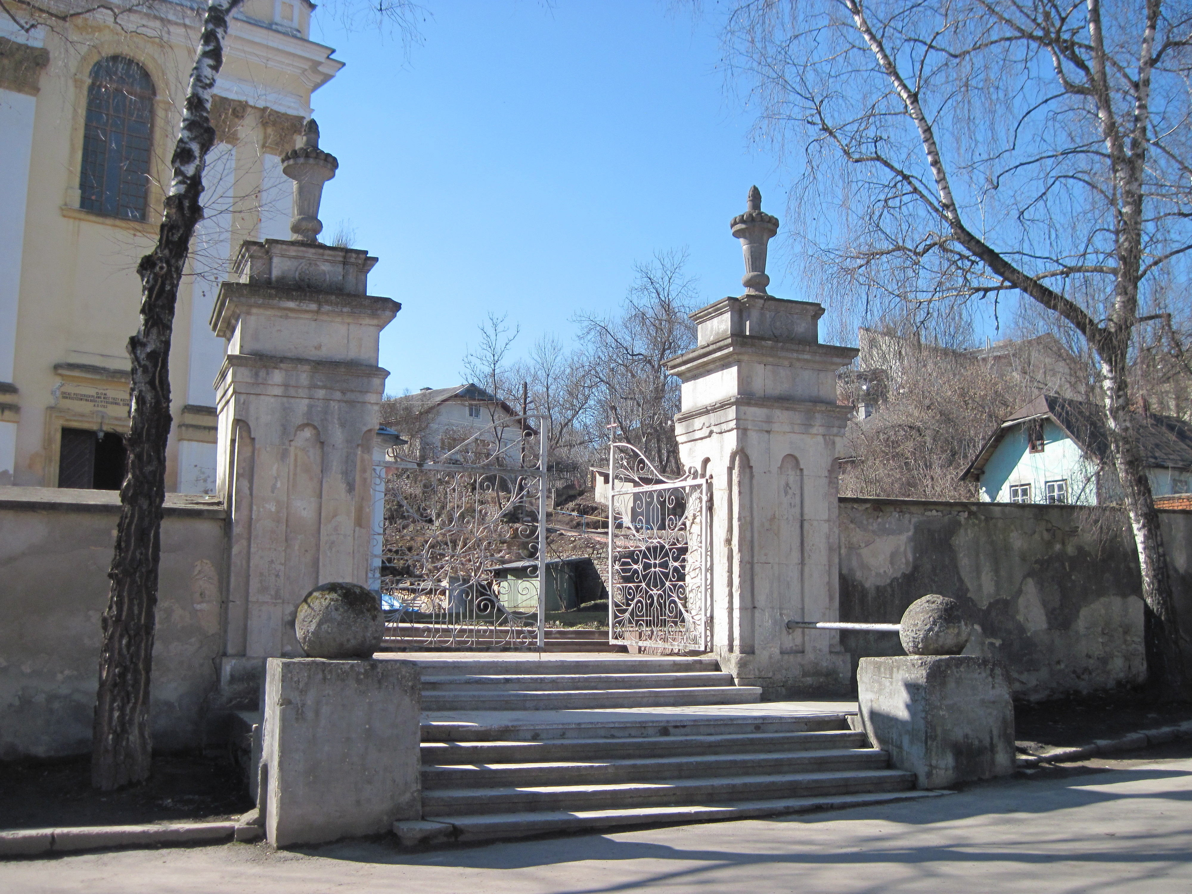 Нова брама, костел Внебовзяття Пресвятої Діви Марії, Бучач, 2015